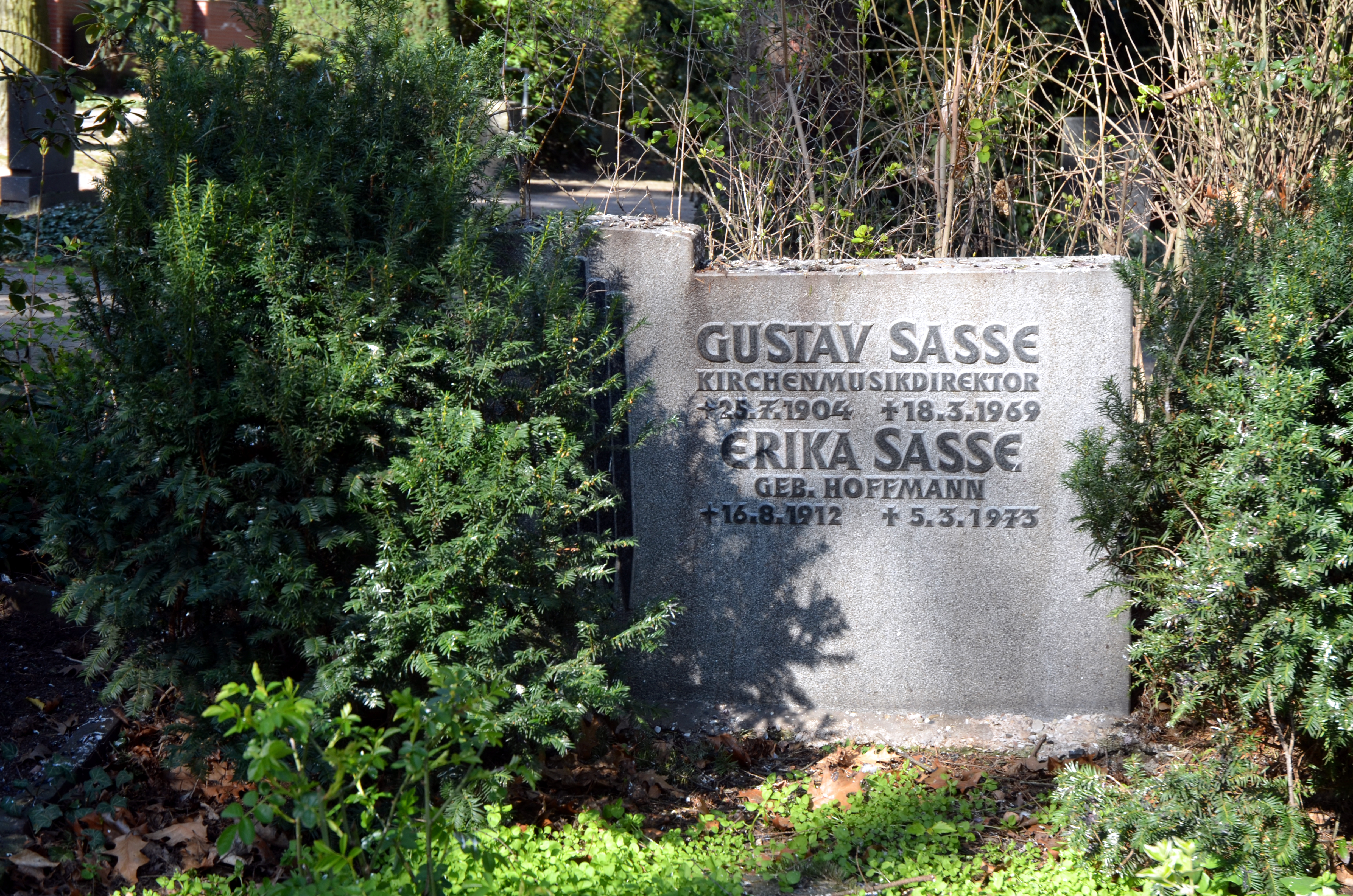 Grabmal für den Organisten, Dirigenten, Orgellehrer, Komponisten und Kirchenmusikdirektor Gustav Sasse (geboren 25. Juli 1904; gestorben 18. März 1969) und dessen Ehefrau Erika Sasse, geborene Hoffmann (geboren 16. August 1912; gestorben 5. März 1973) auf dem Neuen St.-Nikolai-Friedhof in der Nordstadt von Hannover